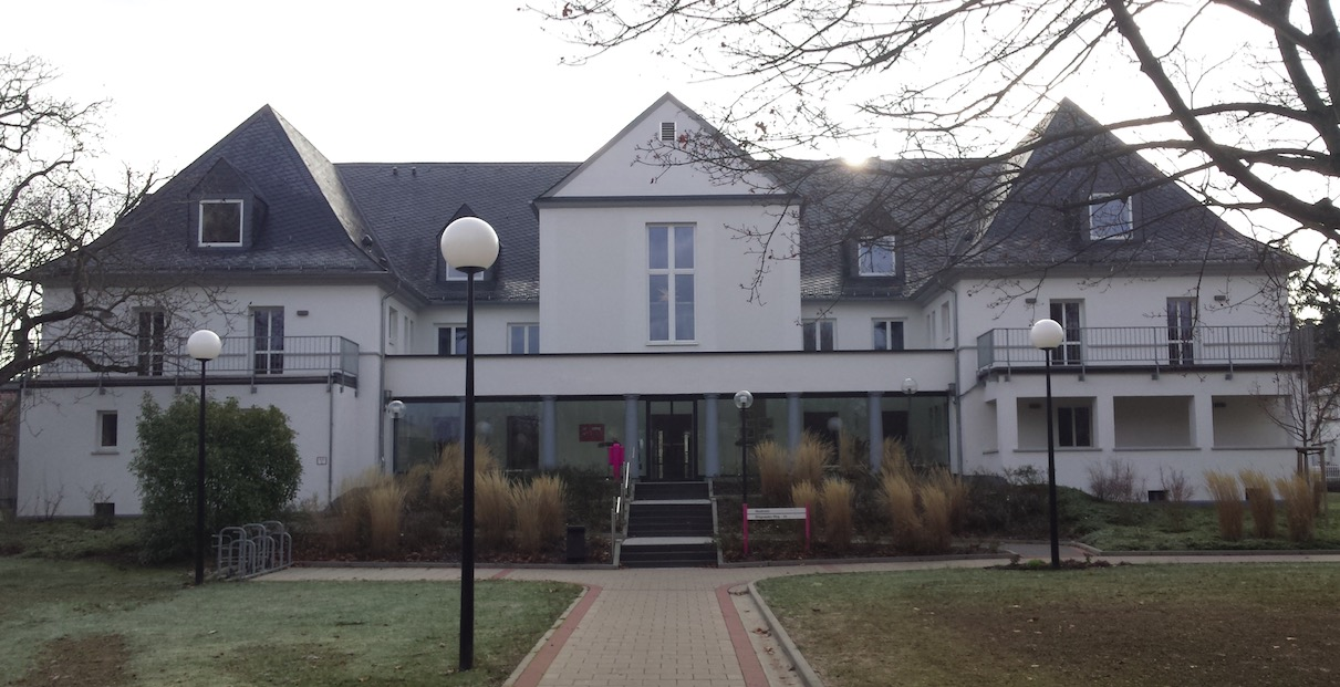 Gebäude Feierabendhaus /Akademie Stiftung kreuznacher diakonie. Architekt Willibald Hamburger